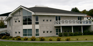 Et kirkebygg i Stavanger